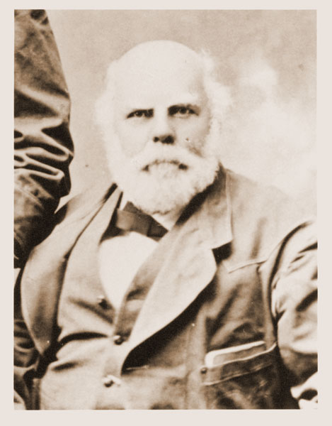 §Summary Bildbeschreibung: Dr. Georg Engelmann (1809-1884) um 1884 Quelle: Missouri Botanical Garden Fotograf/Zeichner: unbekannt Datum: um 1884 andere Versionen: ...